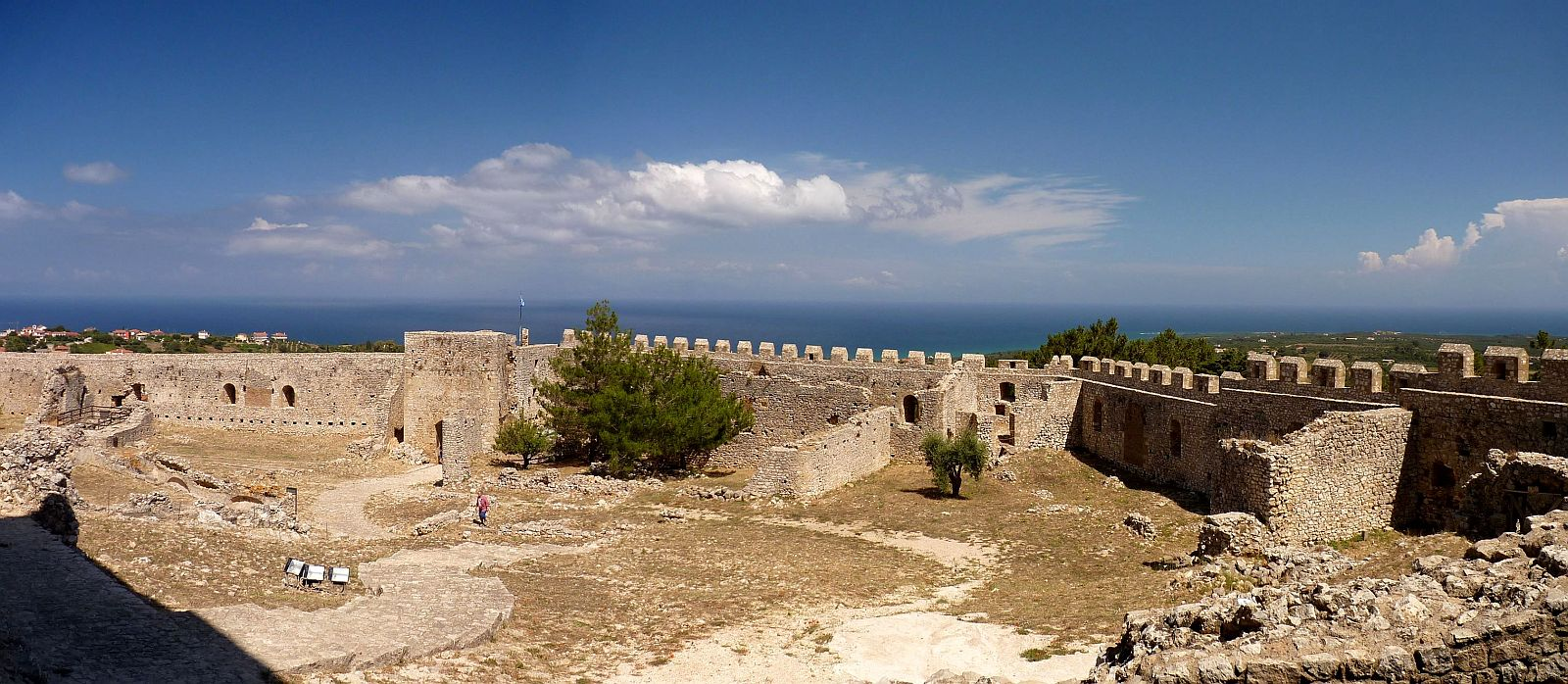 Chlemoutsi (Greek: Χλεμούτσι or Χλουμούτσι) is a medieval castle in the northwest of the Elis regional unit, Greece. It was built by the Crusader rulers of the Principality of Achaea as their main stronghold, and is perhaps the finest fortification of the early Frangokratia period preserved in Greece. But a link to - I would be happy :)